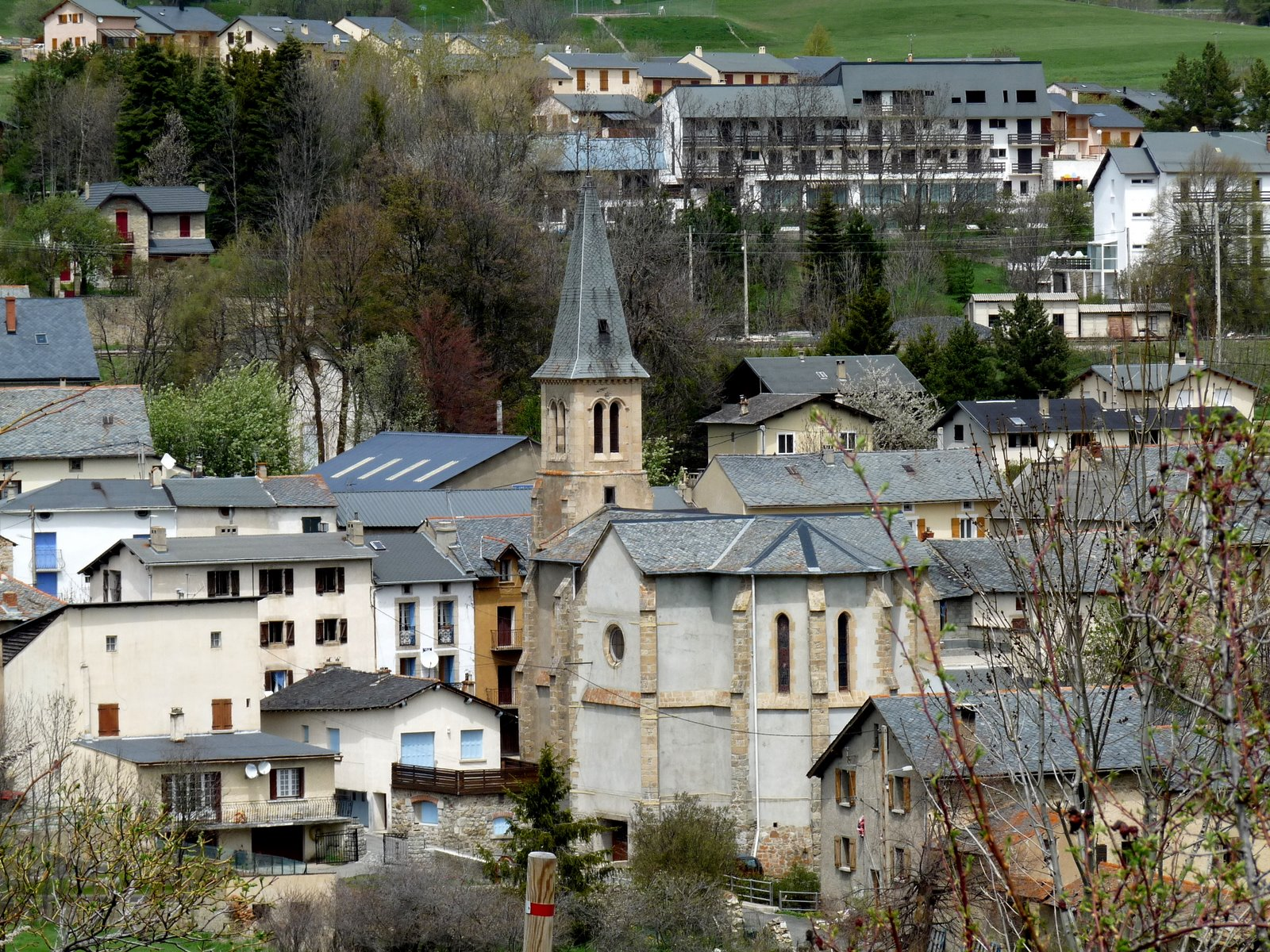 fotografia municipi de la Cabanassa